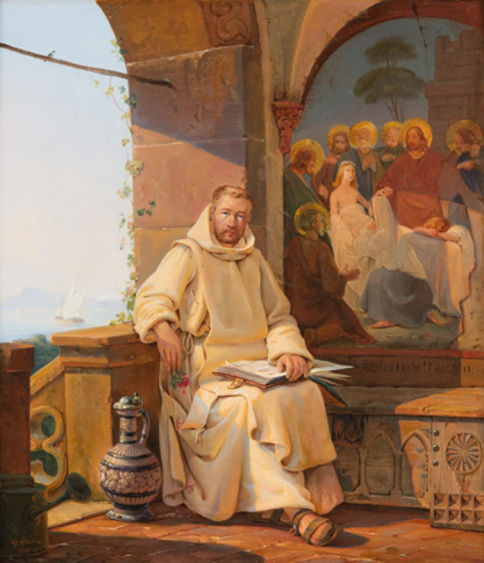 "Der Kartäusermönch", Öl auf Leinwand